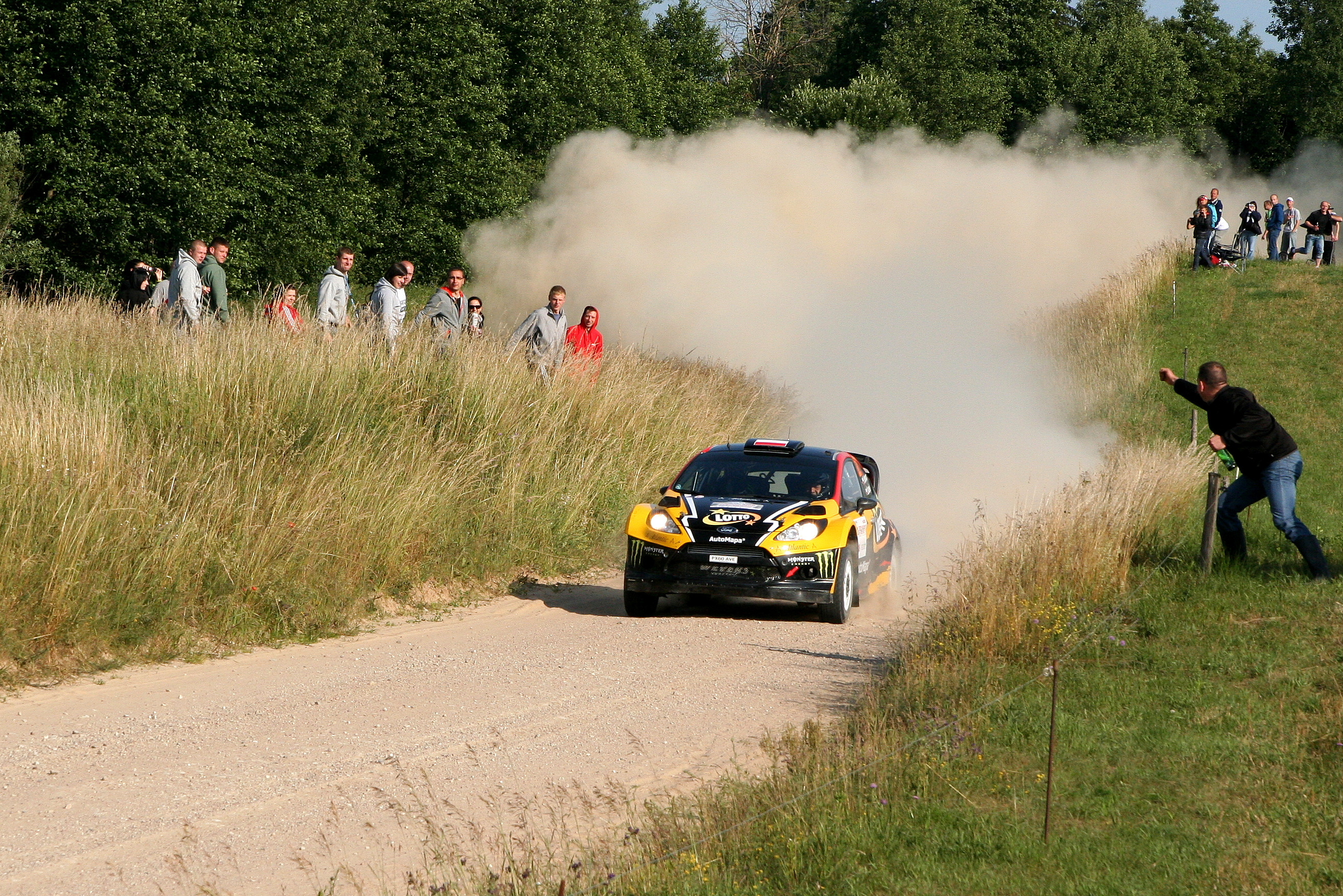 Krzysztof Hołowczyc podczas Rajdu Polski 2014, 11 OS Chmielówka 1